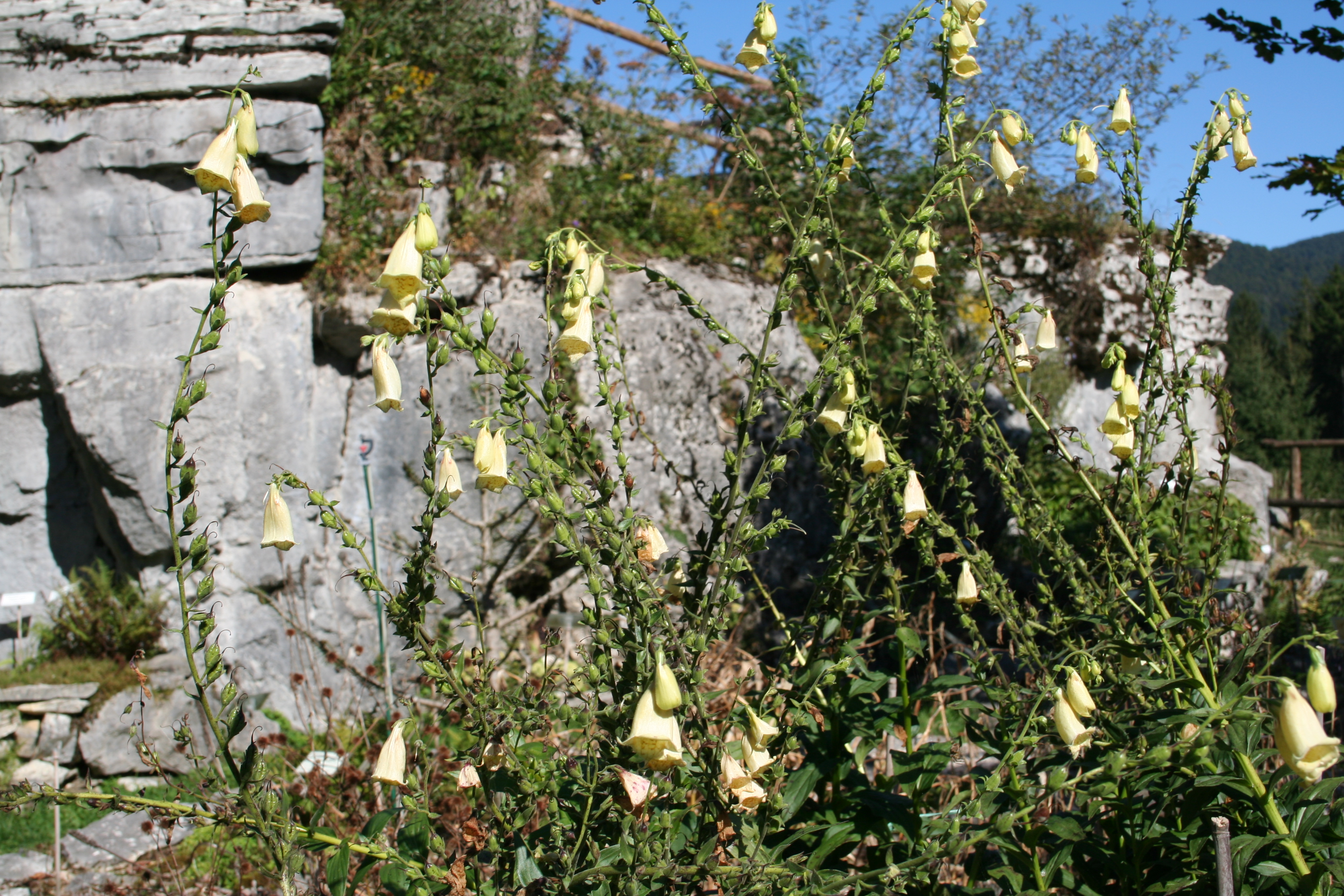 Digitalis_grandiflora (Digitale gialla grande) Località:Giardino Botanico Alpino "Giangio Lorenzoni", Pian Cansiglio, Tambre d'Alpago (BL), 1000 m s.l.m.